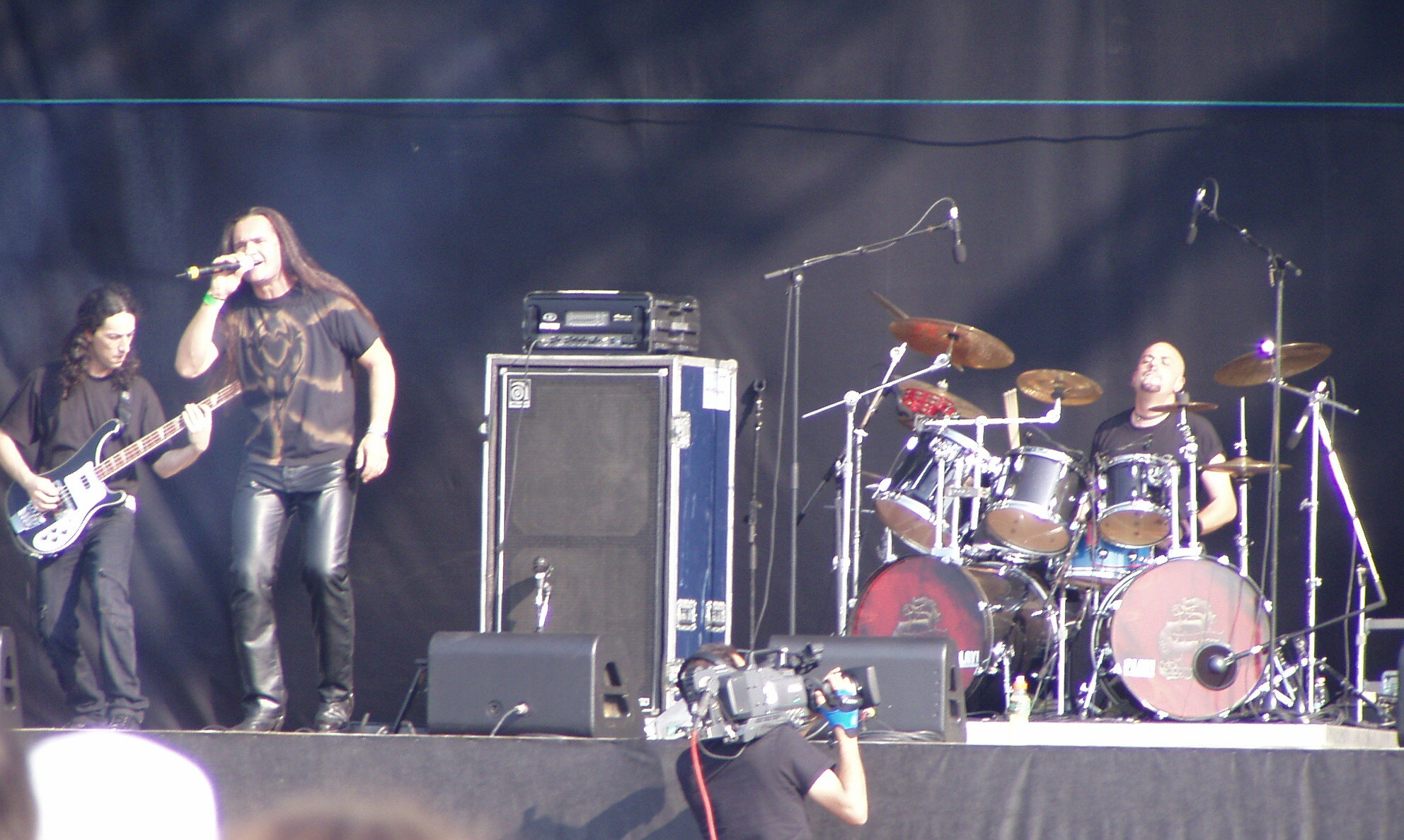 I Domine all'Heineken Jammin' Festival 2007